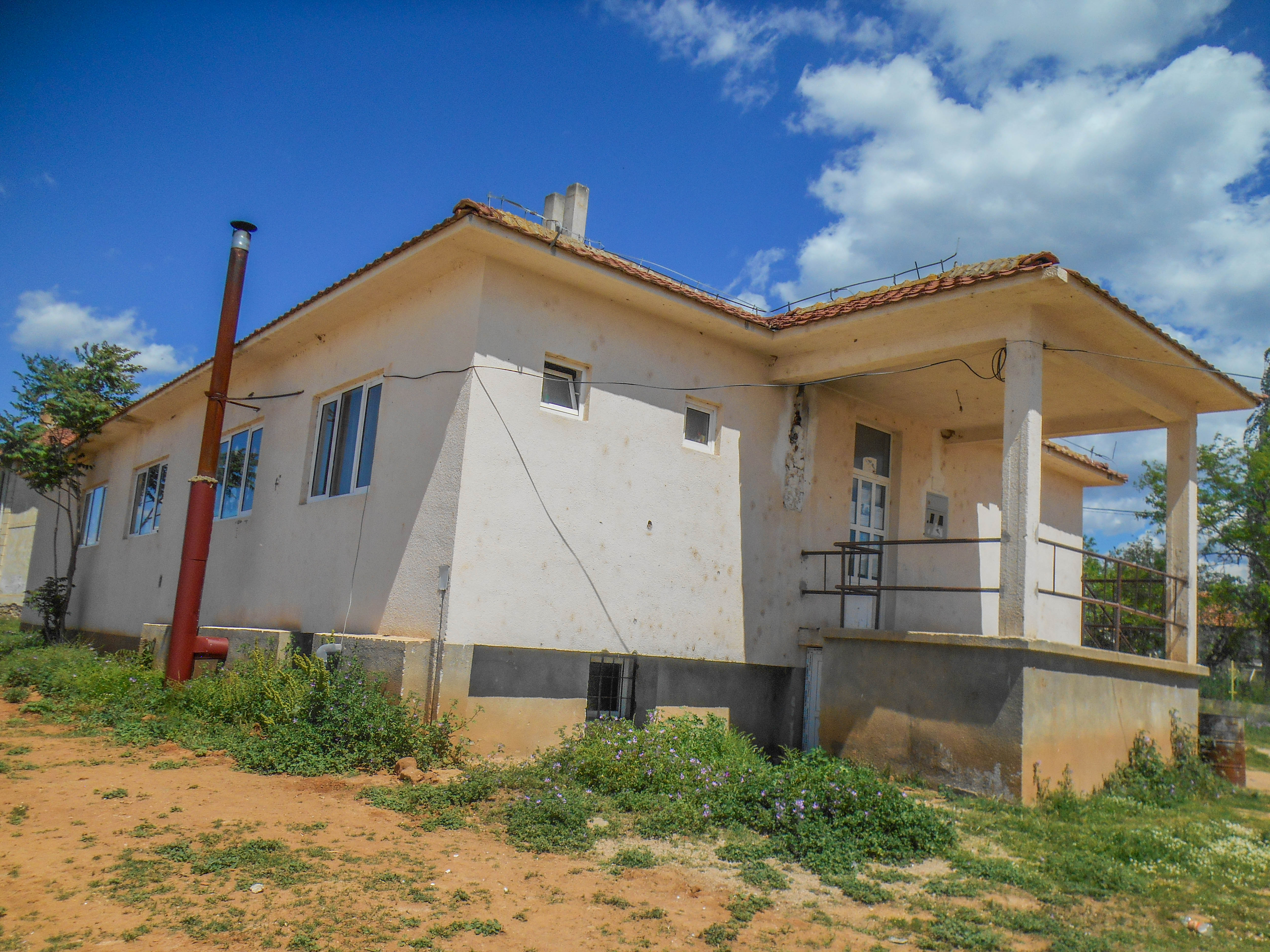 Основно училиште „Атанас Нивичански“ - Доброшинци